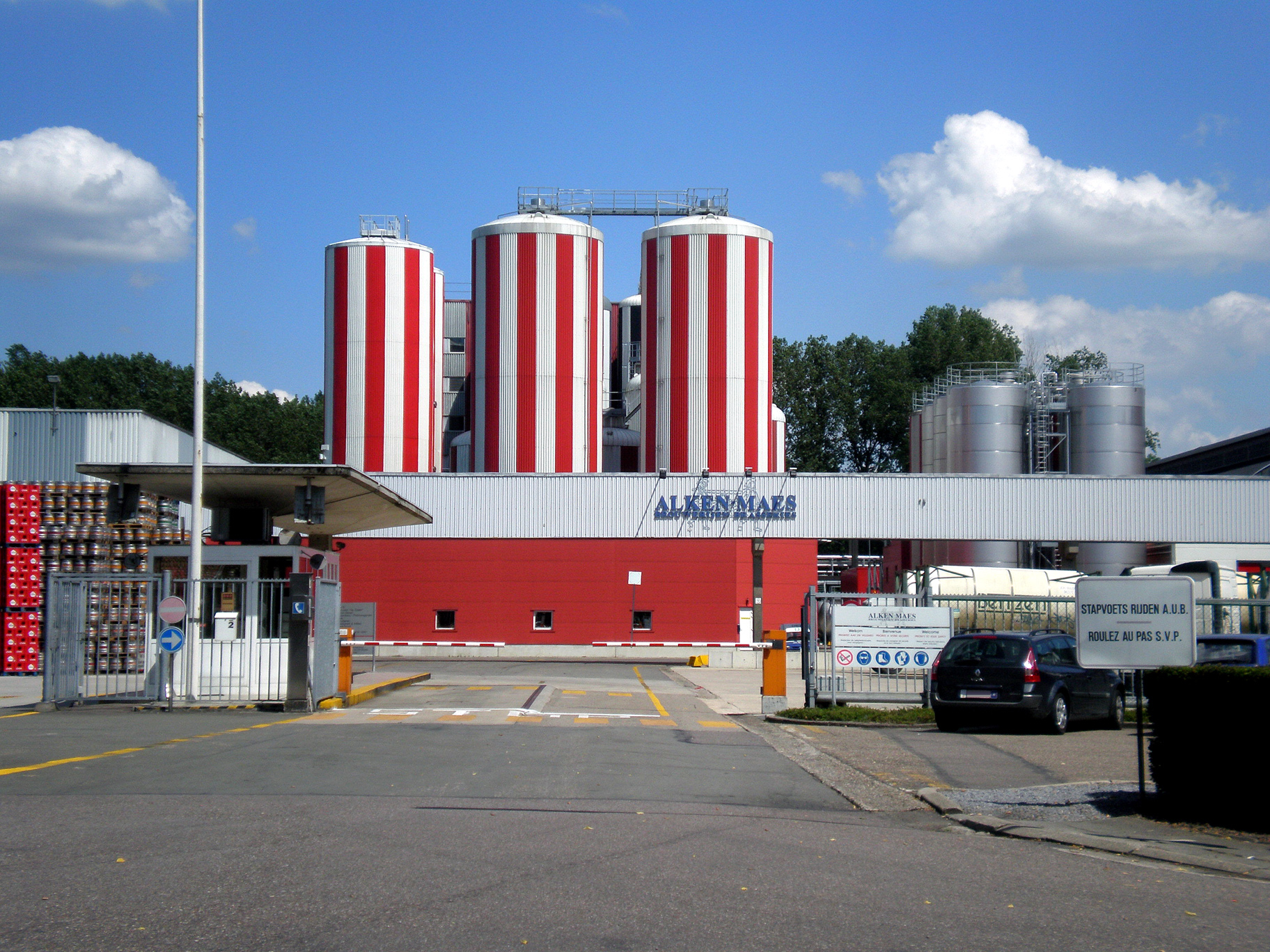 Alken, brewery